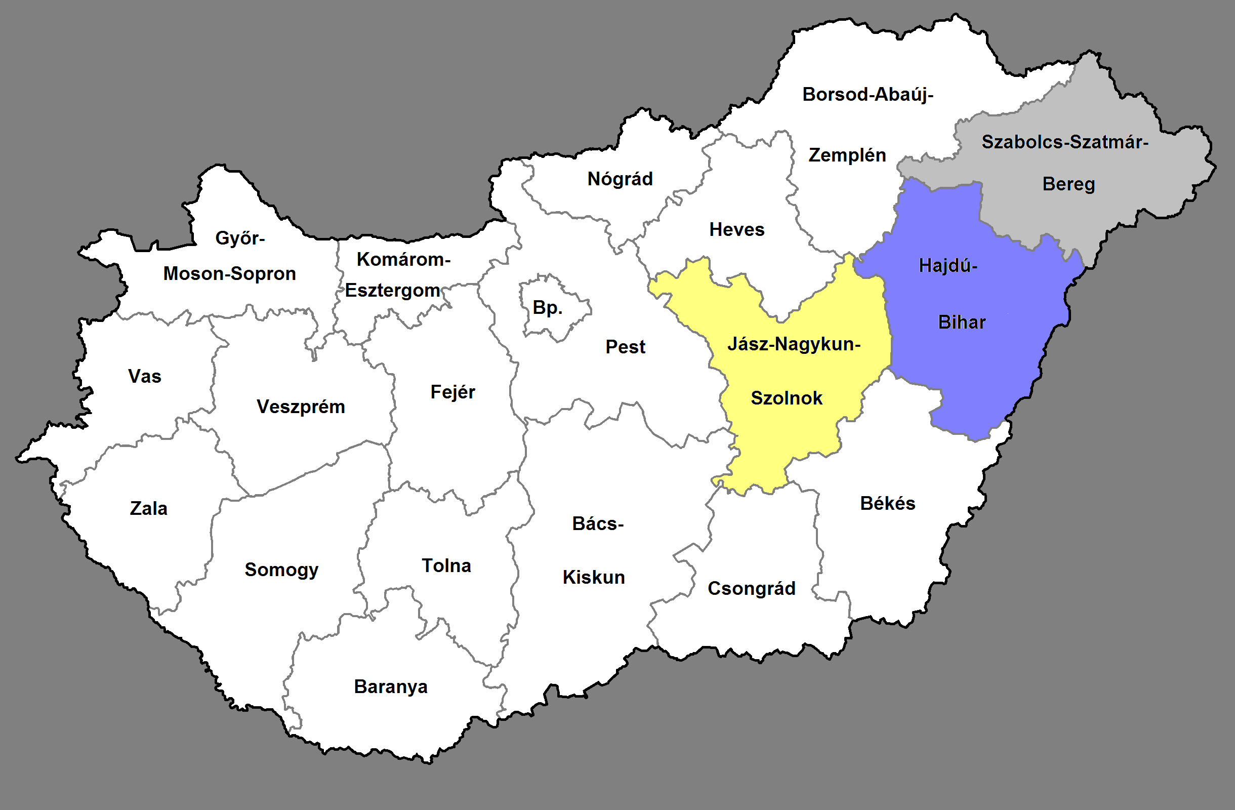 Az Észak-Alföldi régió Magyarországon.